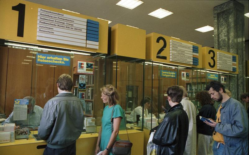 Juni 1988 Bonn